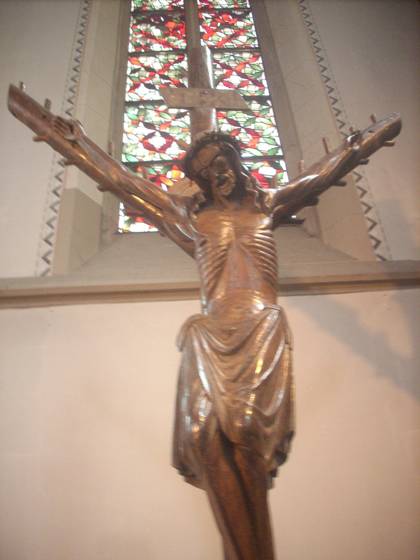 Haltern, kath. Pfarrkirche St. Sixtus, Halterner Kreuz